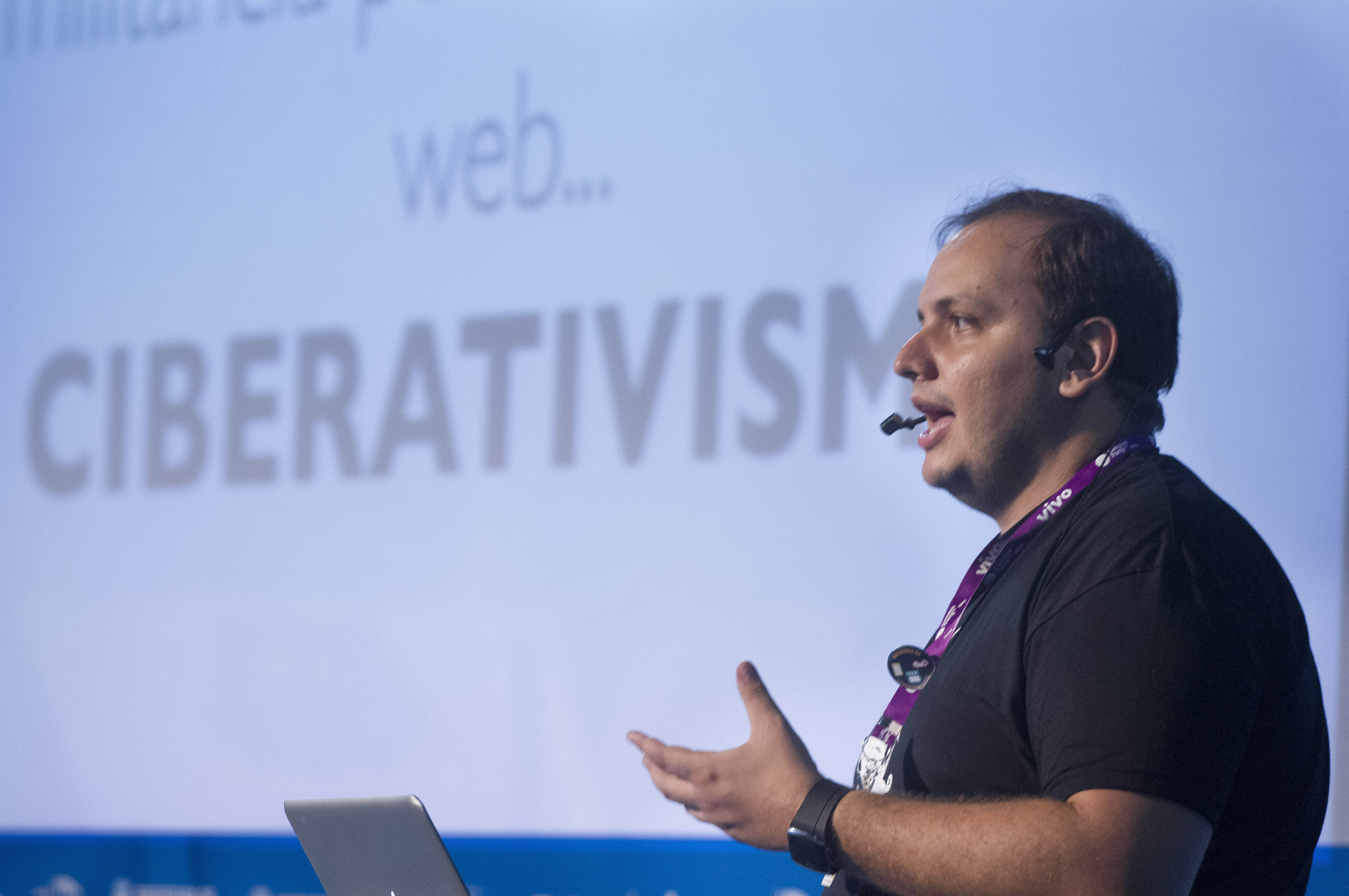 Hacktivismo e Ciberativismo: Guerra eleitoral na internet - Campus TV - Campus Party Brasil 2013 - 31/01/2013 - Foto: Cristiano Sant´Anna/indicefoto